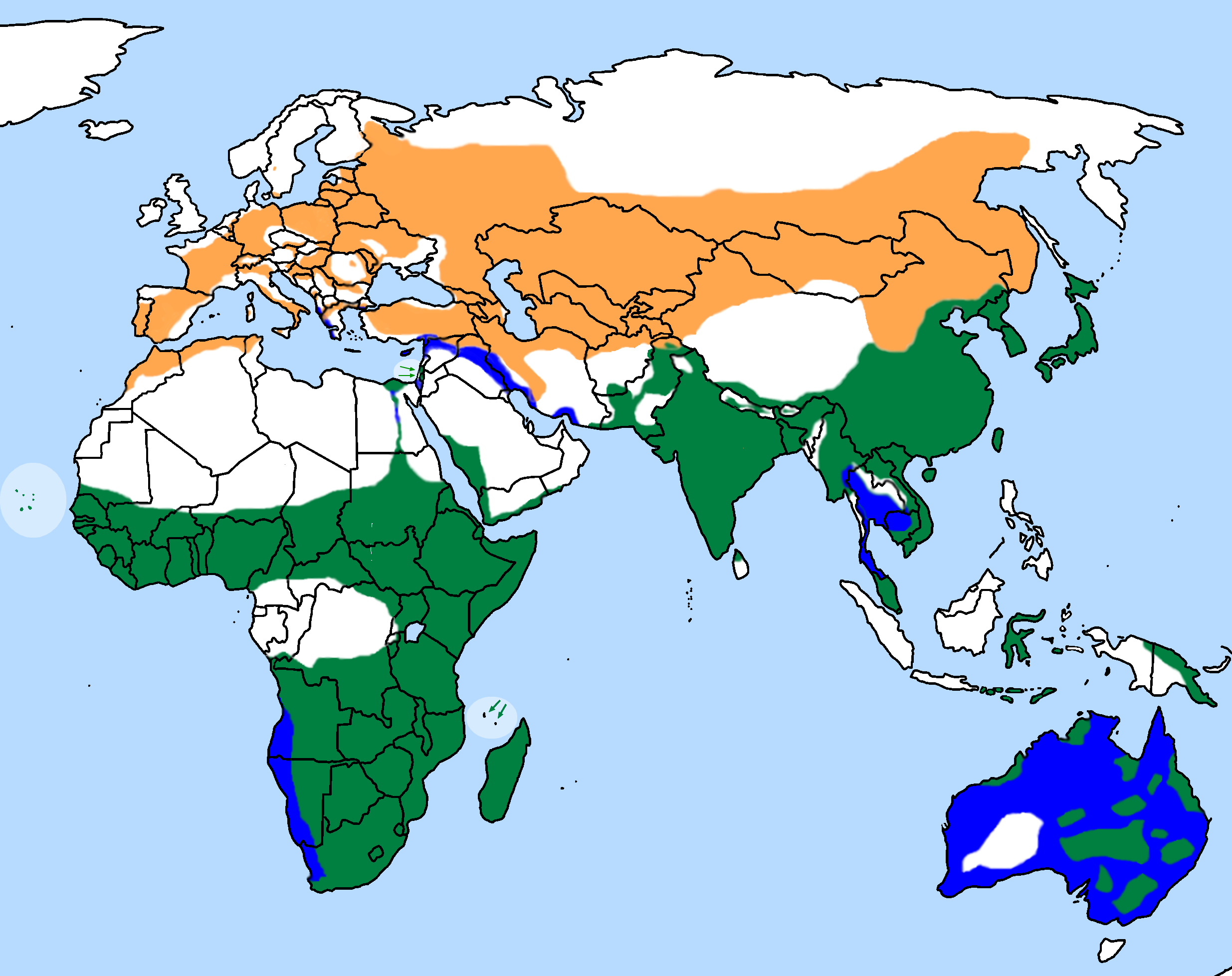 Utbredelse av svartglente (Milvus migrans) ifølge Orta, J., Marks, J.S., Garcia, E.F.J. & Kirwan, G.M. (2018). Black Kite (Milvus migrans). In: del Hoyo, J., Elliott, A., Sargatal, J., Christie, D.A. & de Juana, E. (eds.). Handbook of the Birds of the World Alive. Lynx Edicions, Barcelona. (retrieved from on 25 June 2018).